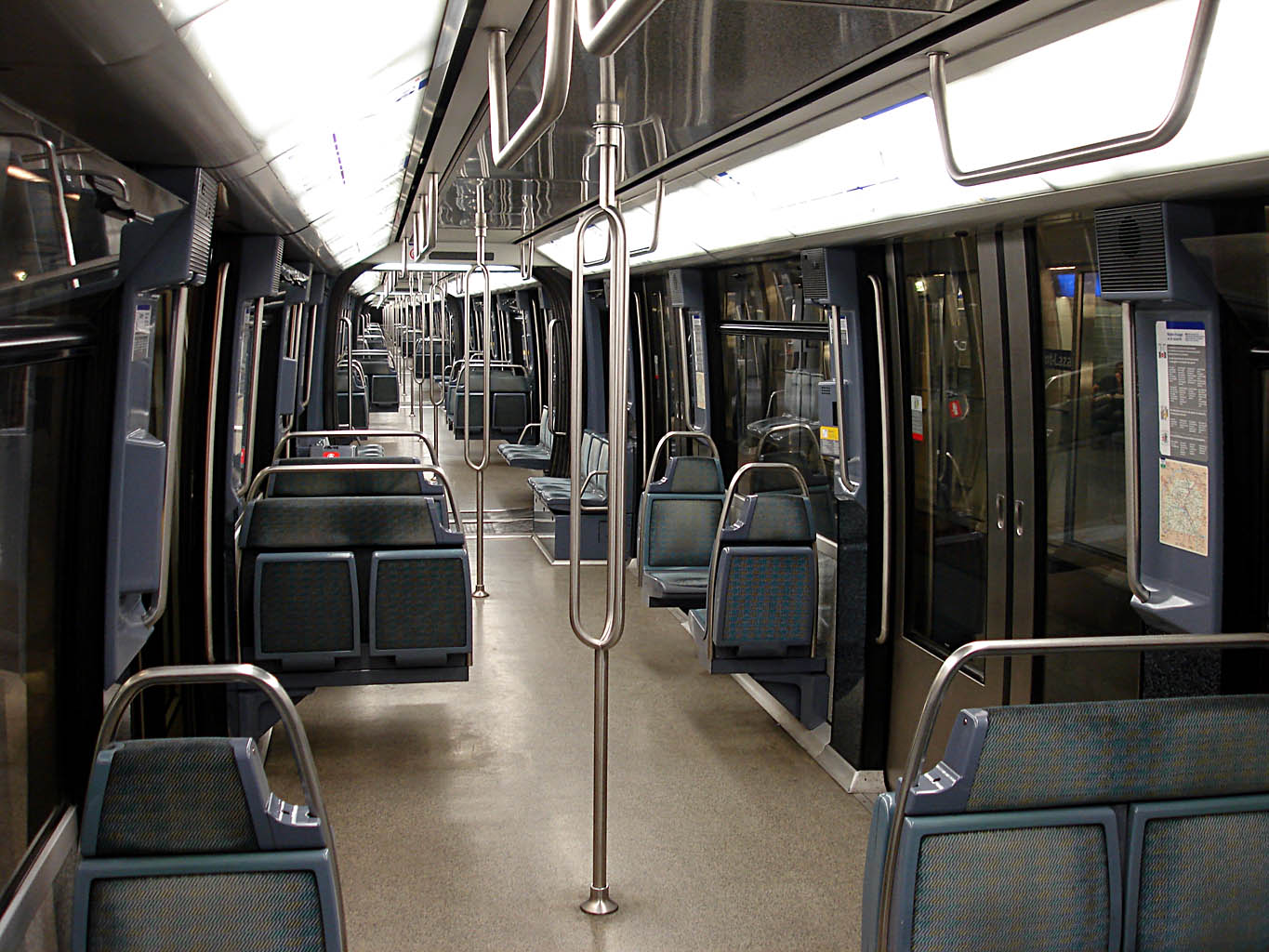 Intérieur d'une rame MP 89 CA de la ligne 14 du métro de Paris, France